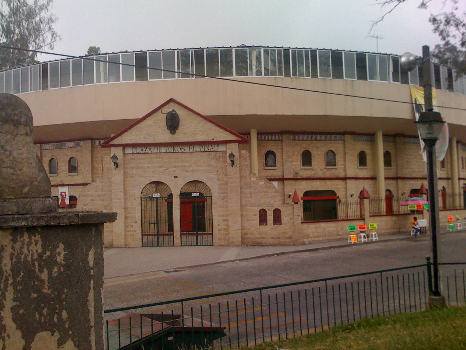 En el sur de la ciudad